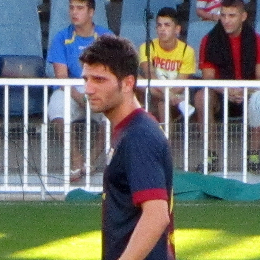 Carles Planas in a 2012-13 FC Barcelona B home kit. Foto realizada por Javier Segura (@castroquini)